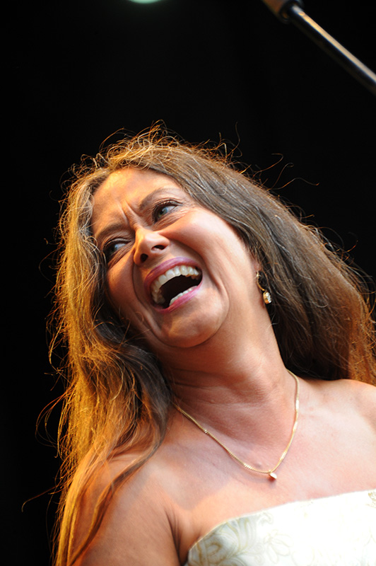 Anna-Lotta Larsson at the 2014 Stockholm Folk Festival.